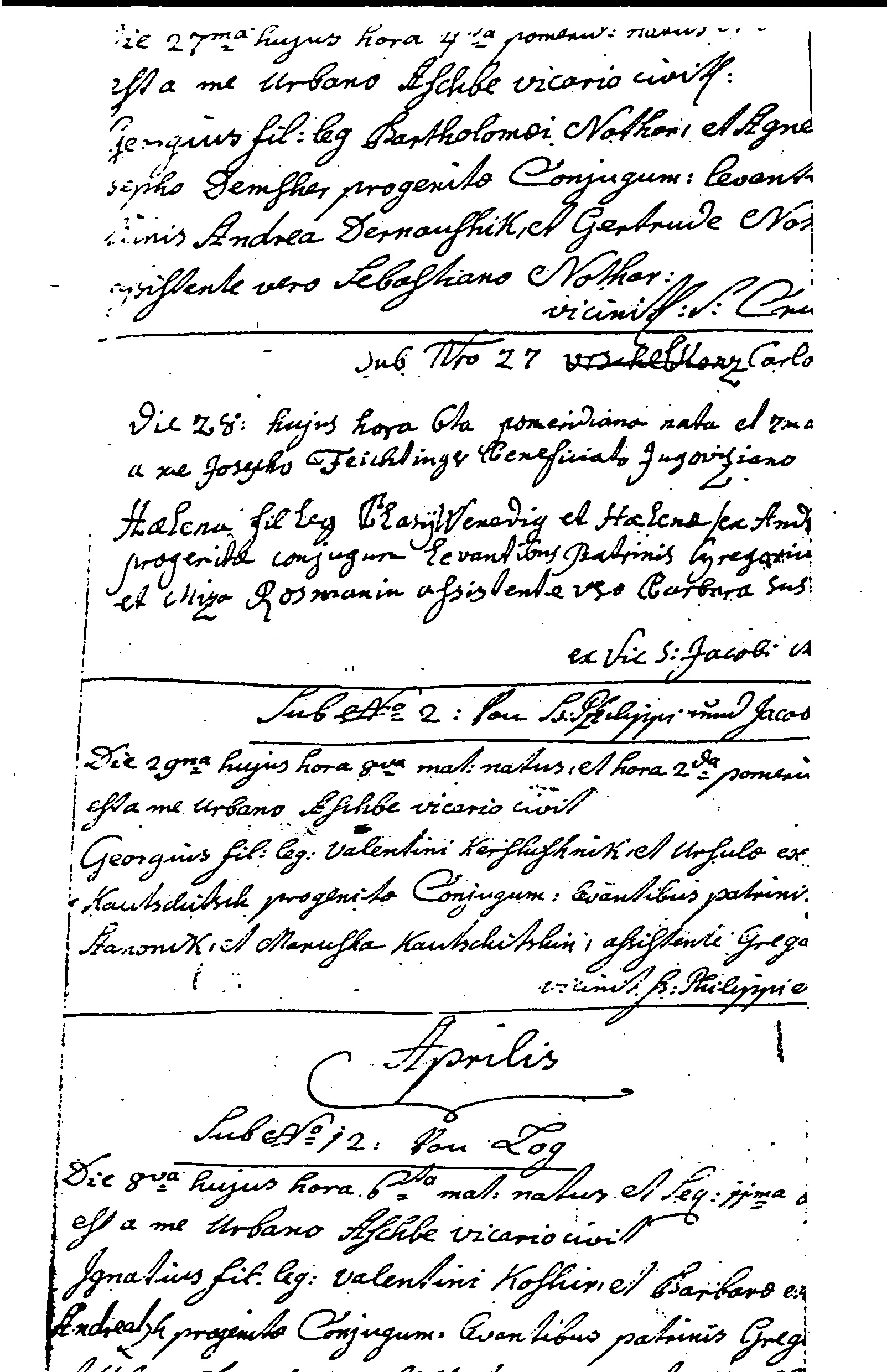 Vložek iz narativne rojstne matične knjige iz leta 1770.